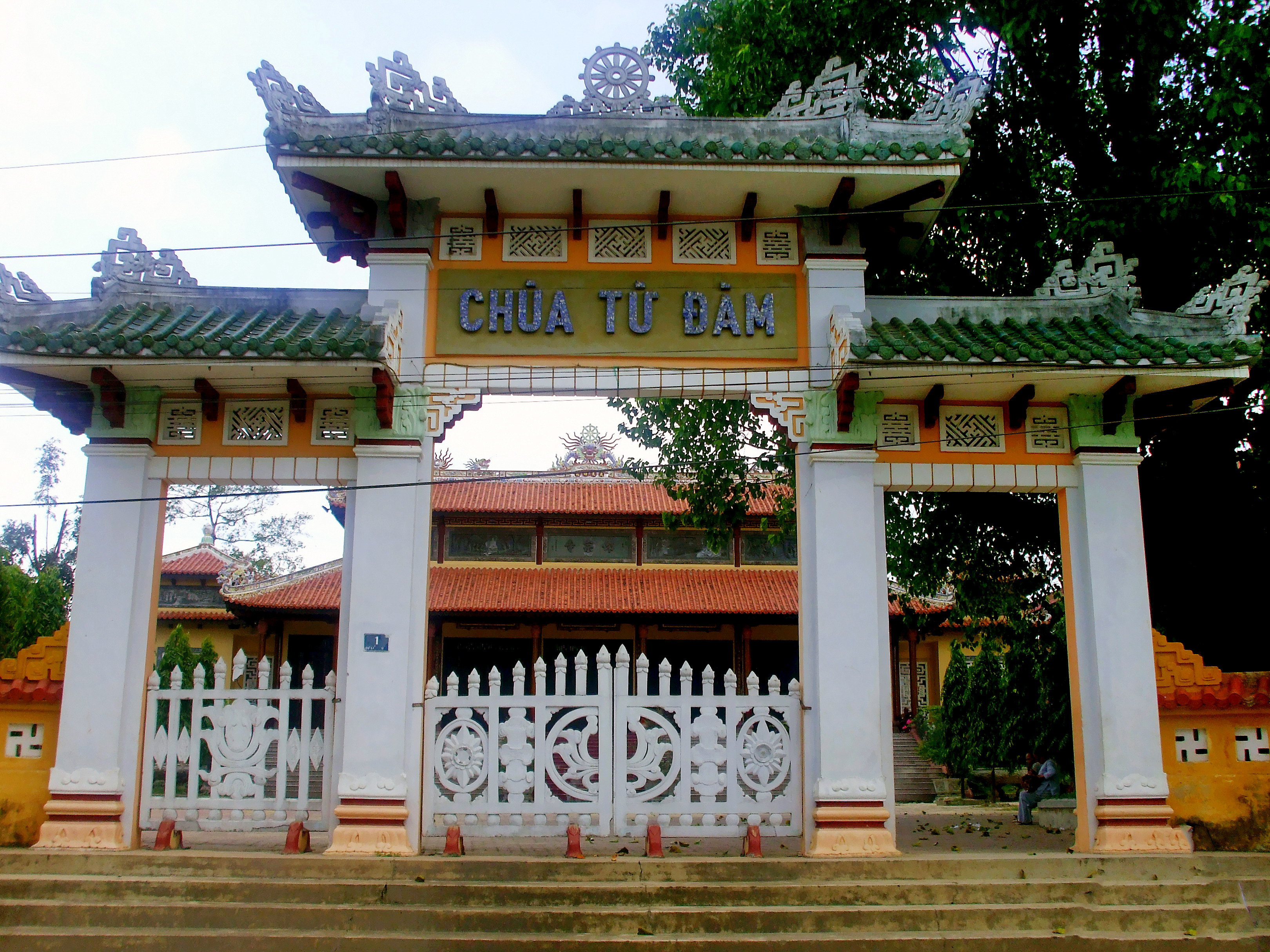 Chùa Từ Đàm là một danh lam, hiện tọa lạc tại số 1 đường Sư Liễu Quán; thuộc phường Trường An, thành phố Huế, tỉnh Thừa Thiên-Huế, Việt Nam.